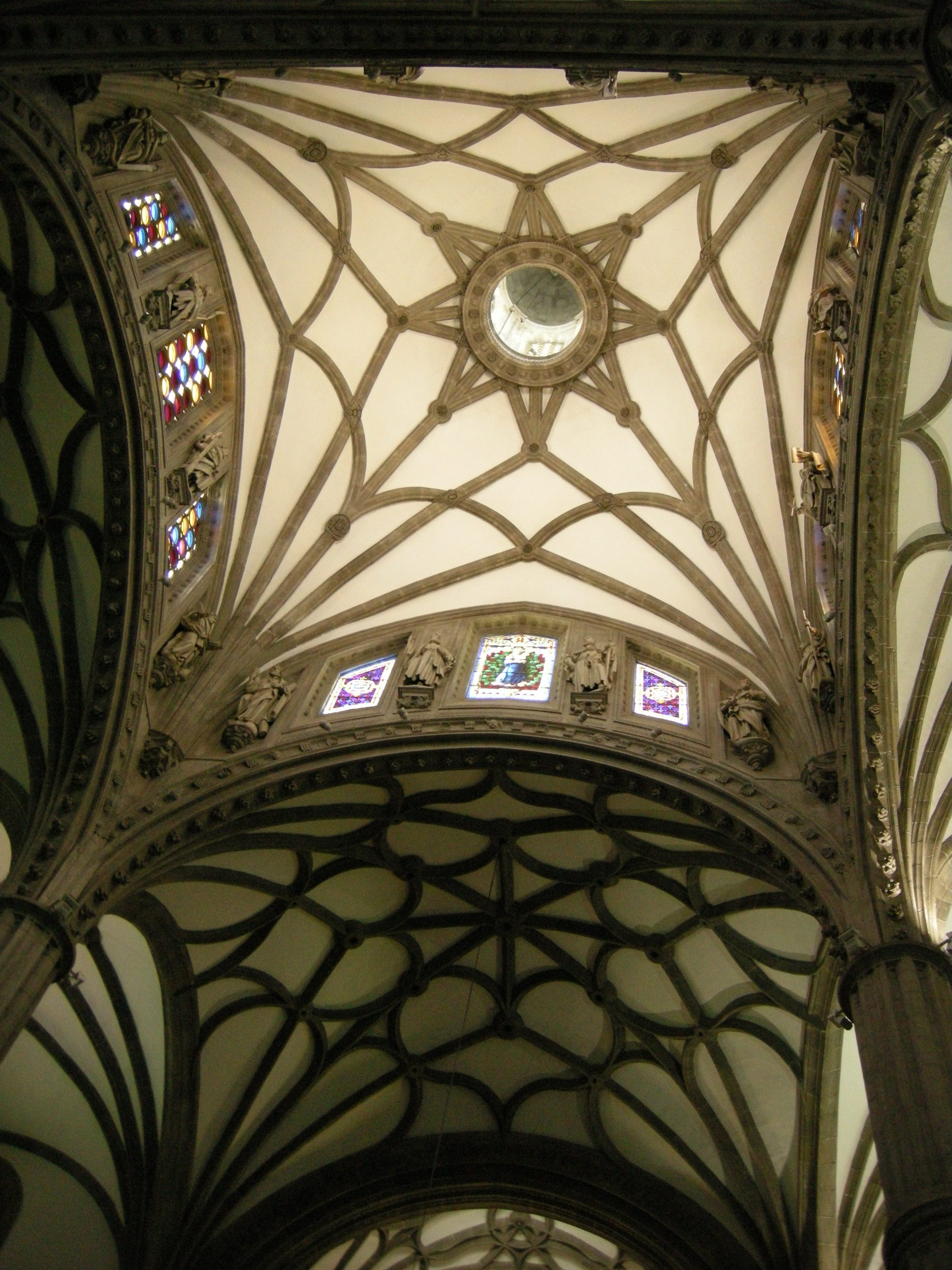 Catedral de santa ana, interno 10.1